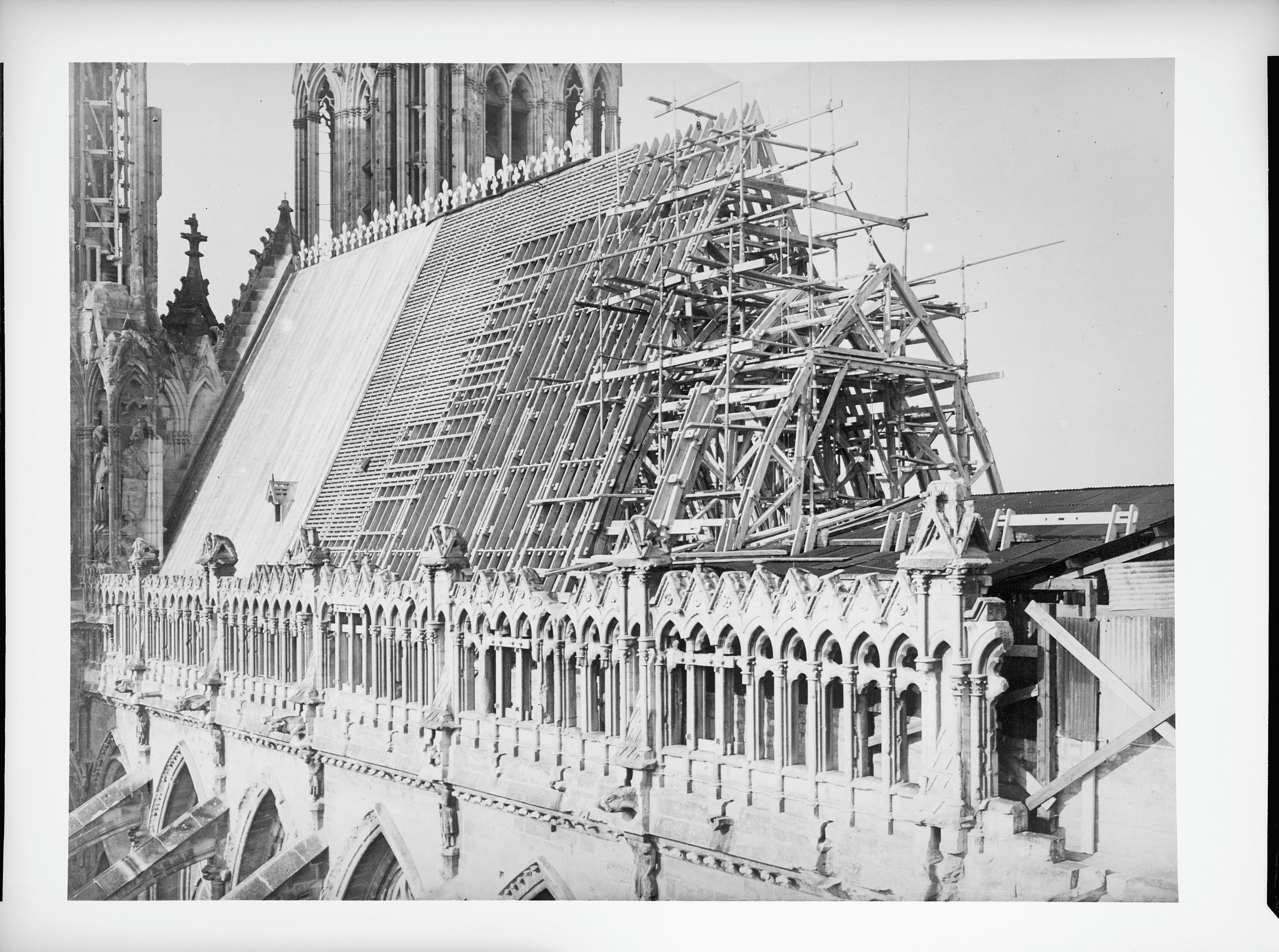 Reconstruction du toit de la cathédrale de Reims conduite par H.Deneux, 1926.